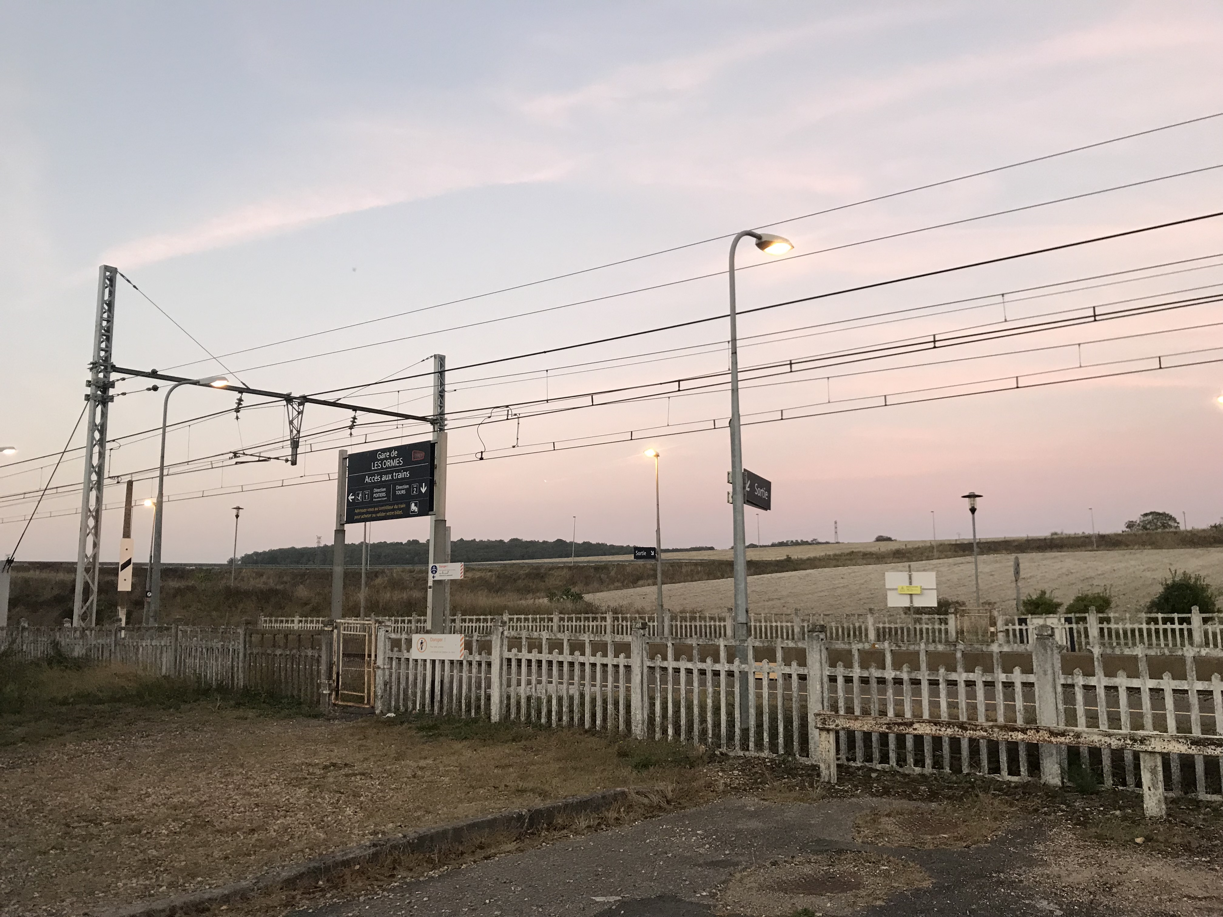 Gare des Ormes (86) dans la Vienne, octobre 2018